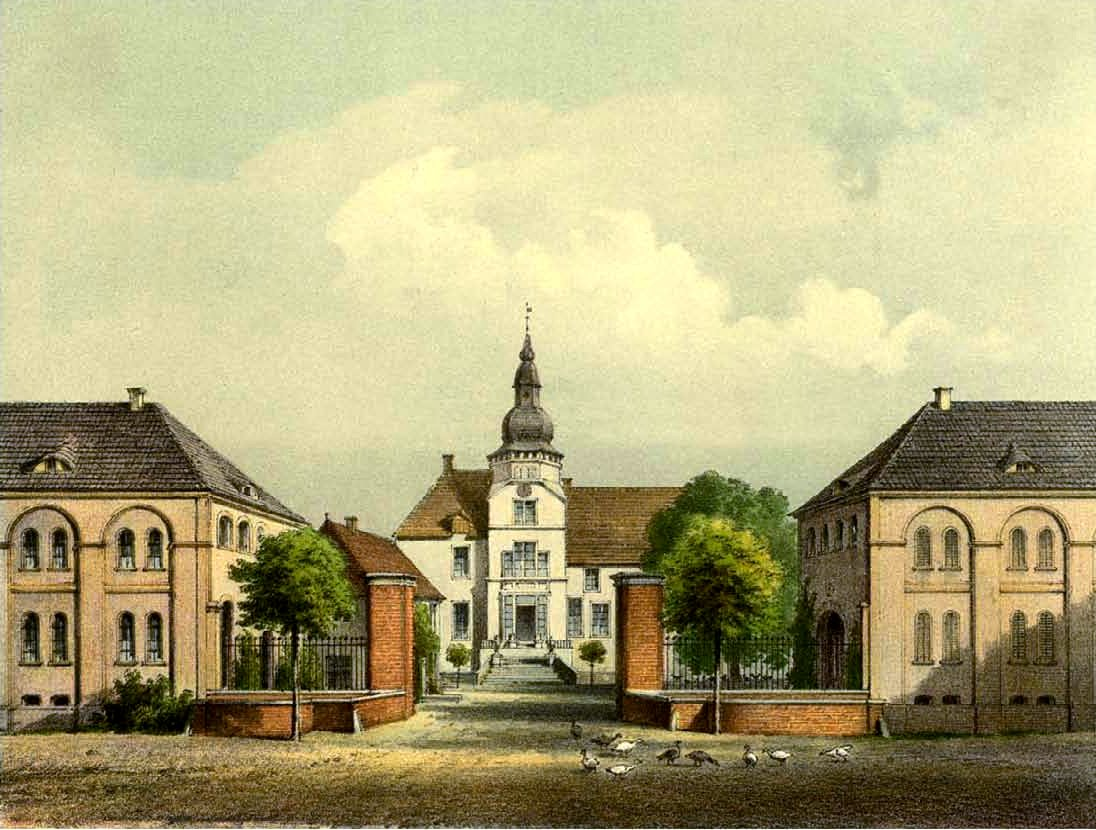 Schloss Sandfort, Kreis Lüdinghausen